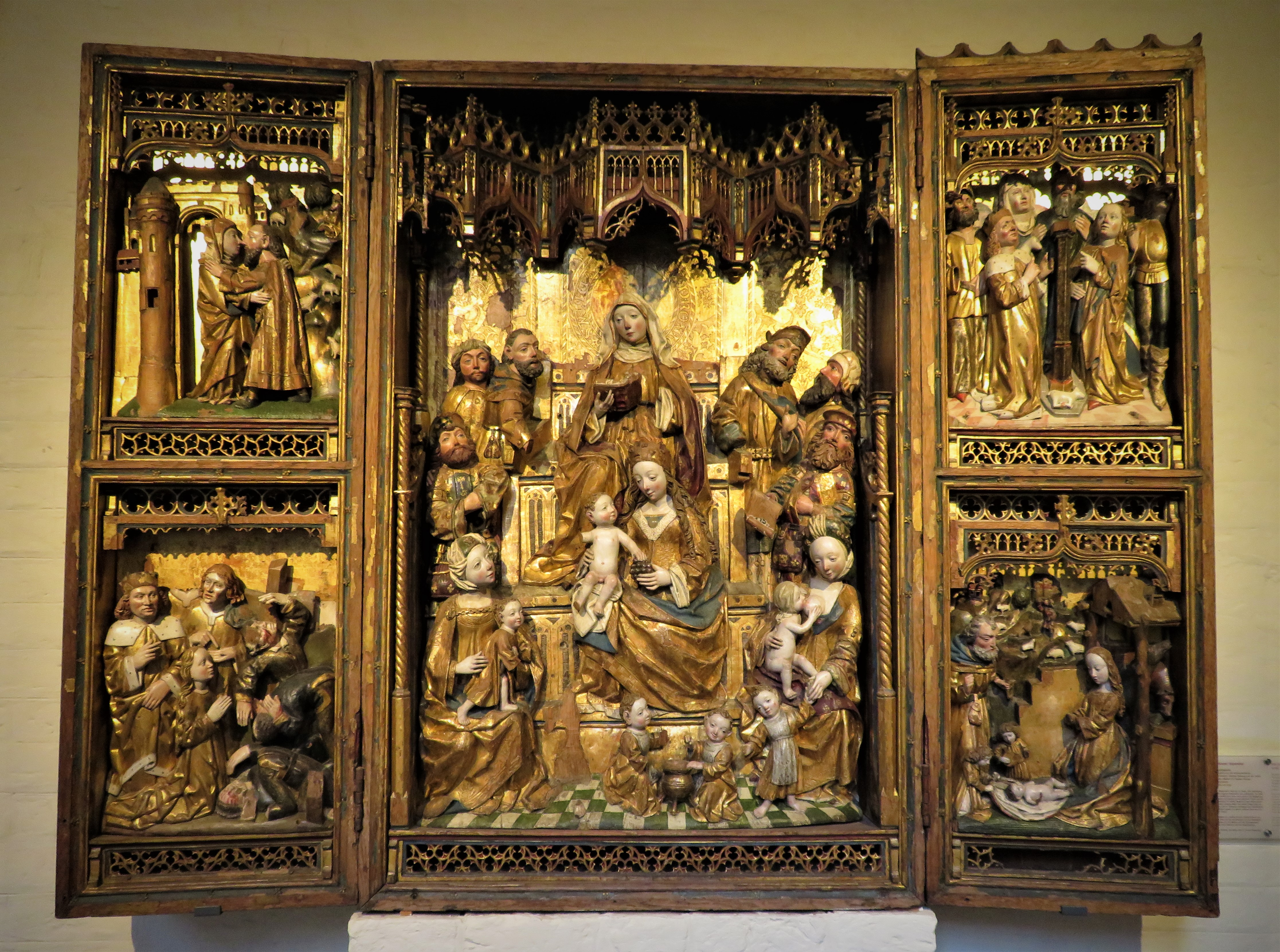 Fügelretabel mit der Heiligen Sippe (Sog. Schlutuper Sippenaltar), aus der Katharinenkirche, sp:ater in St. Andres, Schlutup, heute im St.-Annen-Museum Lübeck, Schreinskulpturen und zwei zugehörige flügelreilfs dem Meister des Schlutuper Altars aus dem Umkreis von henning van der Heyde um 1500 zugeschrieben, zwei ursprünglich nicht zugehörige Flügelreleifs (links unten, rechts oben) auys dem Leben der Hl. Katharina um 1480/90